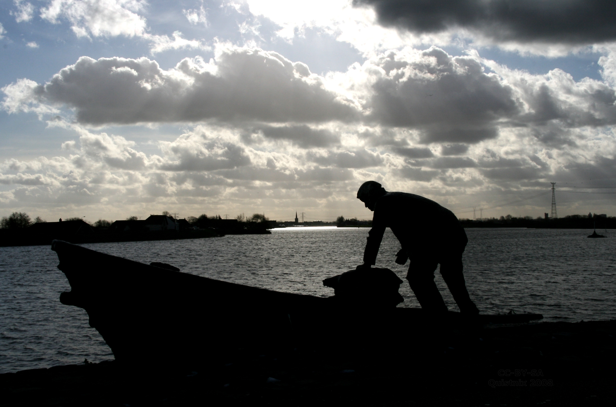 Nieuwerkerk aan den IJssel: "Een dubbeltje op zijn kant", herinnert aan de Watersnood van 1953